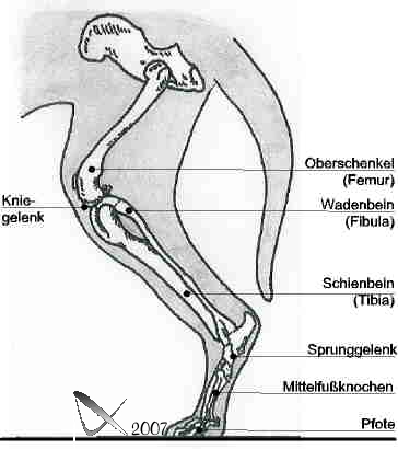 dog hind leg